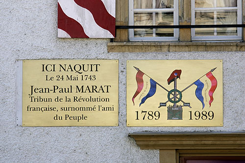 Geburtshaus des Revolutionärs Jean-Louis Marat à Boudry